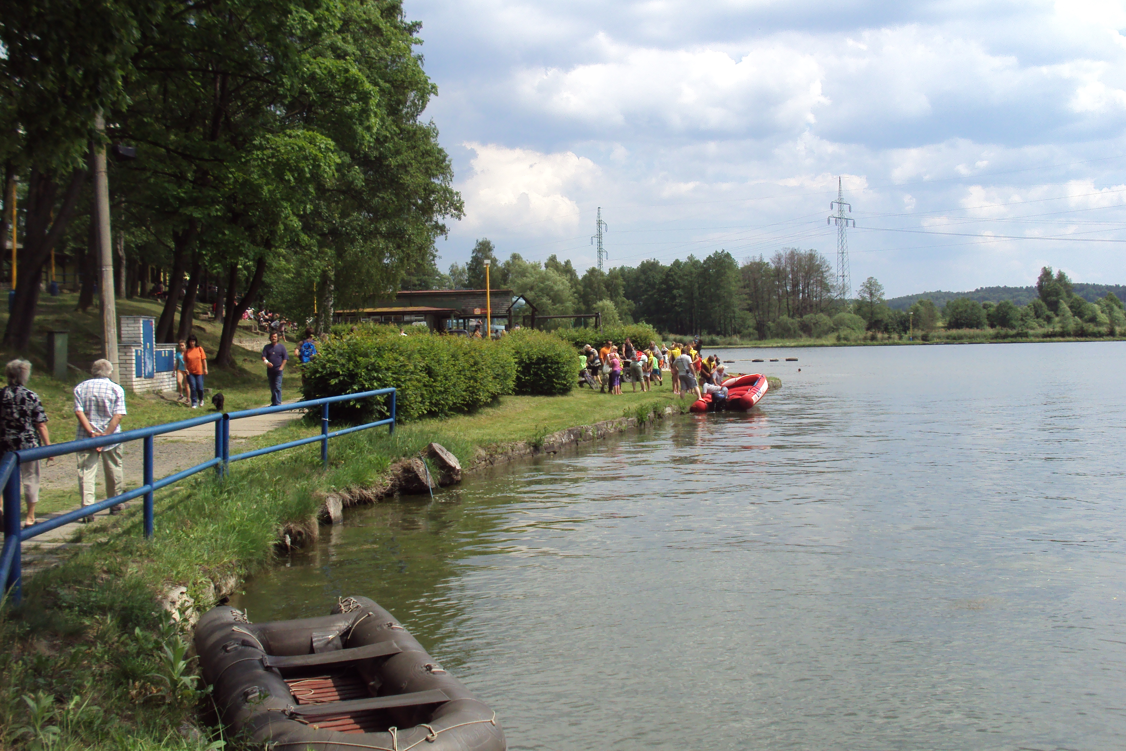 Koupaliště Zákupy v mapách Zákupský rybník, cesta od vchodu na pláž